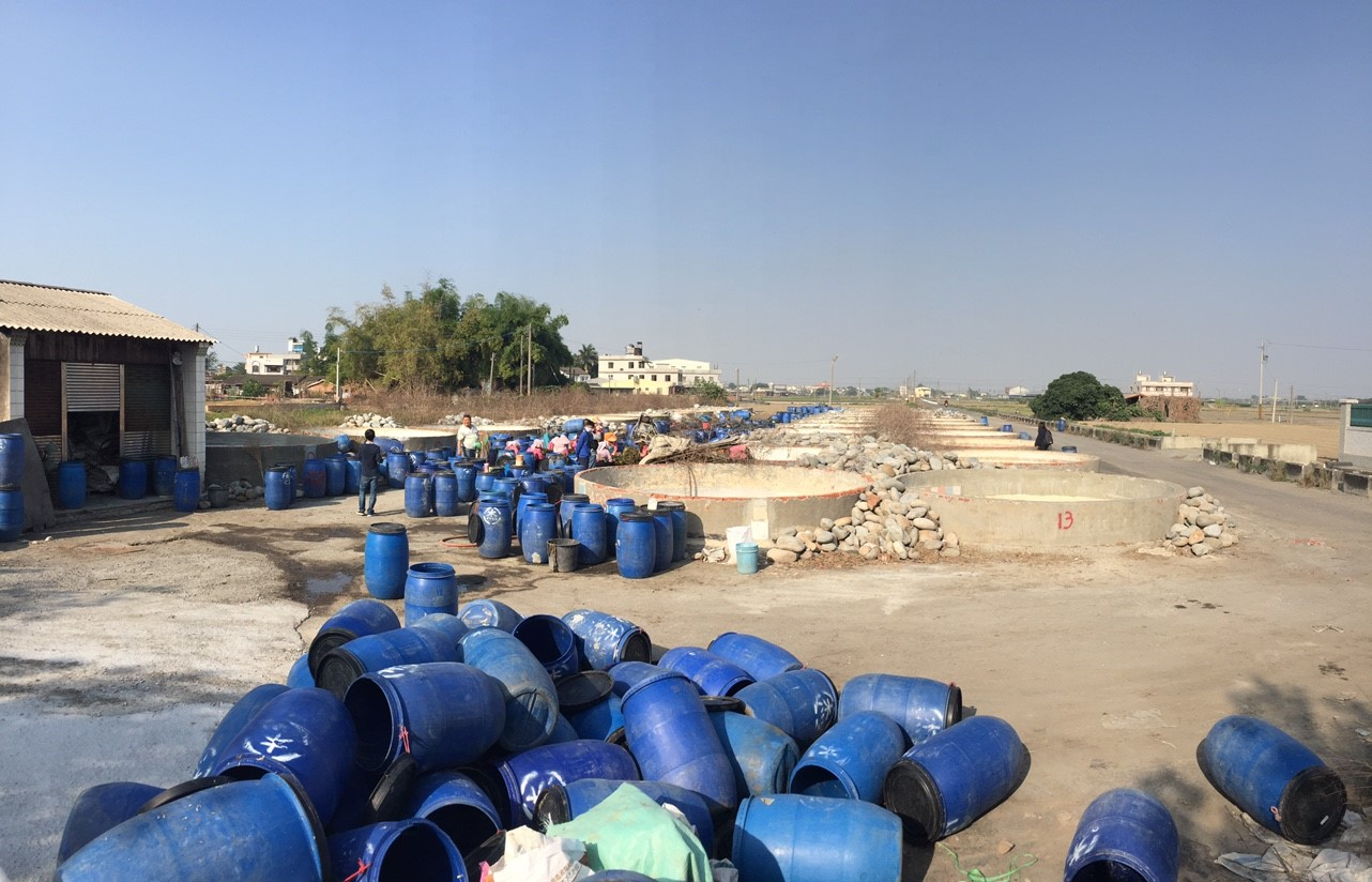 中文（台灣）: 製作游東酸菜的井